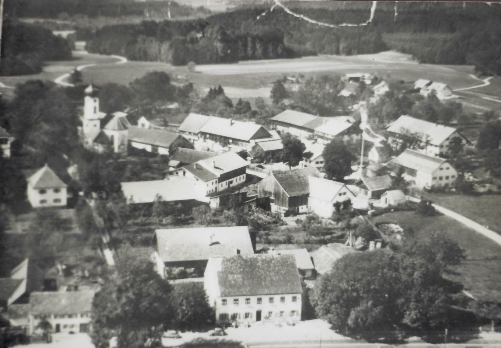 Wangen, historische Luftaufnahme aus dem Jahre 1950